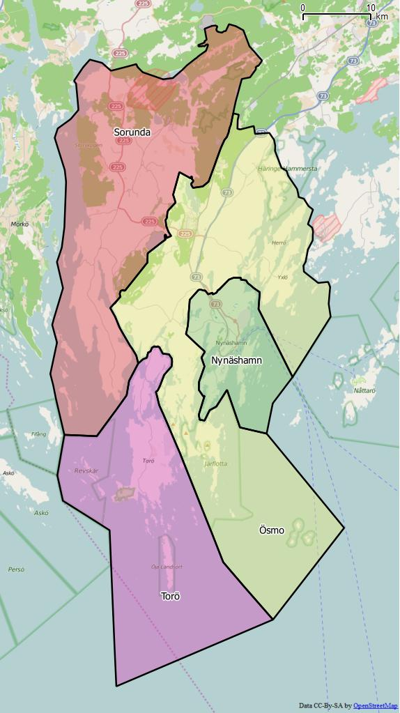 Distriktsindelningen i Nynäshamns kommun World file: 102.08984069378895754 0 0 -102.08984069378895754 1963995.37187956133857369 8210144.82474356237798929